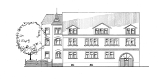 Fassadenplanung Lolita Liening